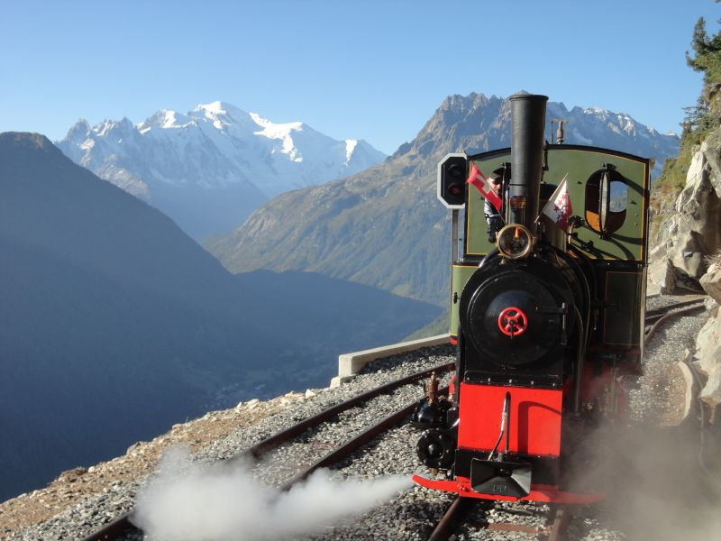 Jung-Lok No1693/1911 "Liseli" am 15.09.2012 im Parc d'Attractions du Châtelard, Panoramabahn. Hinten der Mt Blanc. Bild: Thomas Brändle, Schweiz